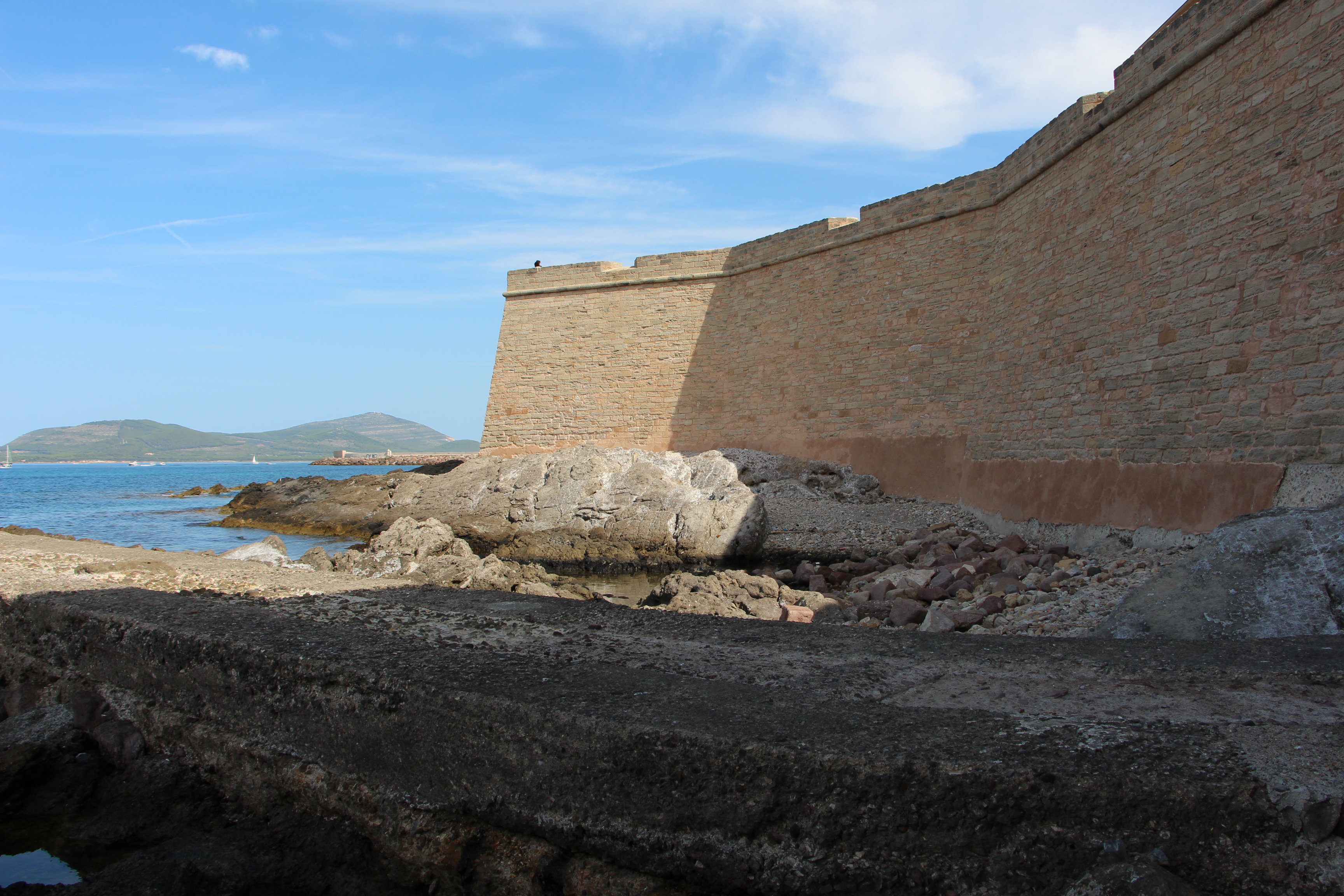 Alghero, mura e altri edifici